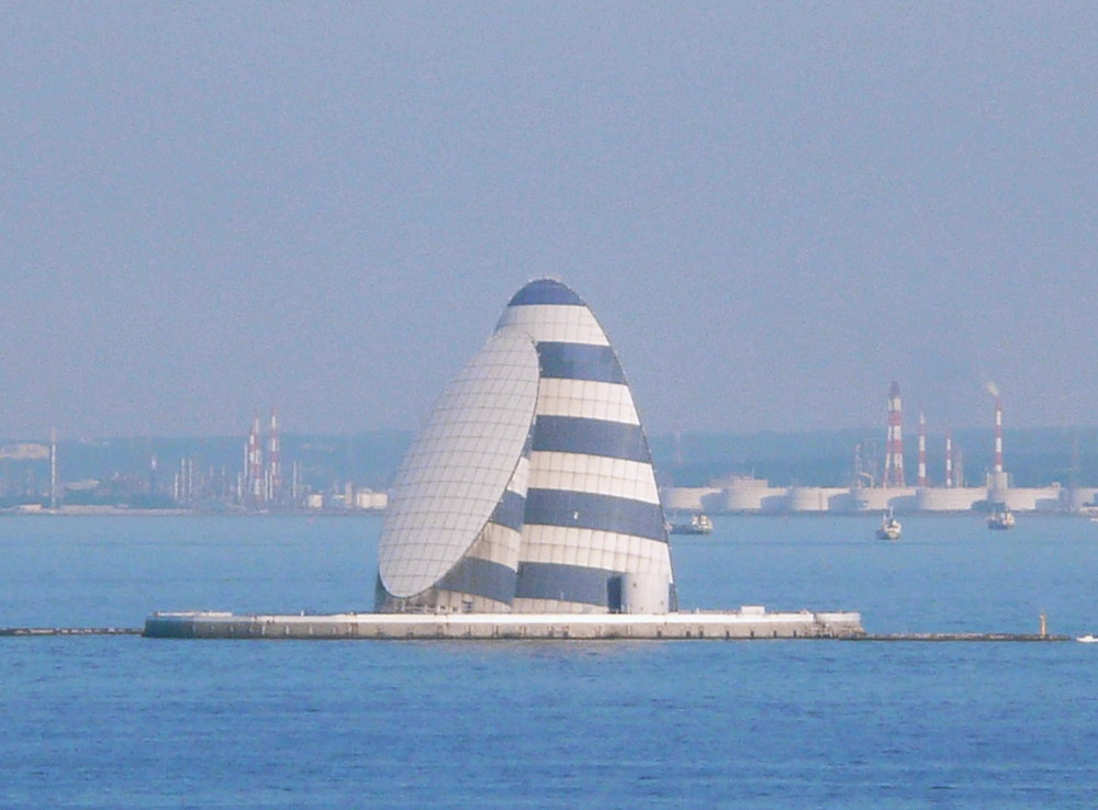 風の塔こと川崎人工島 川崎マリエンから撮影